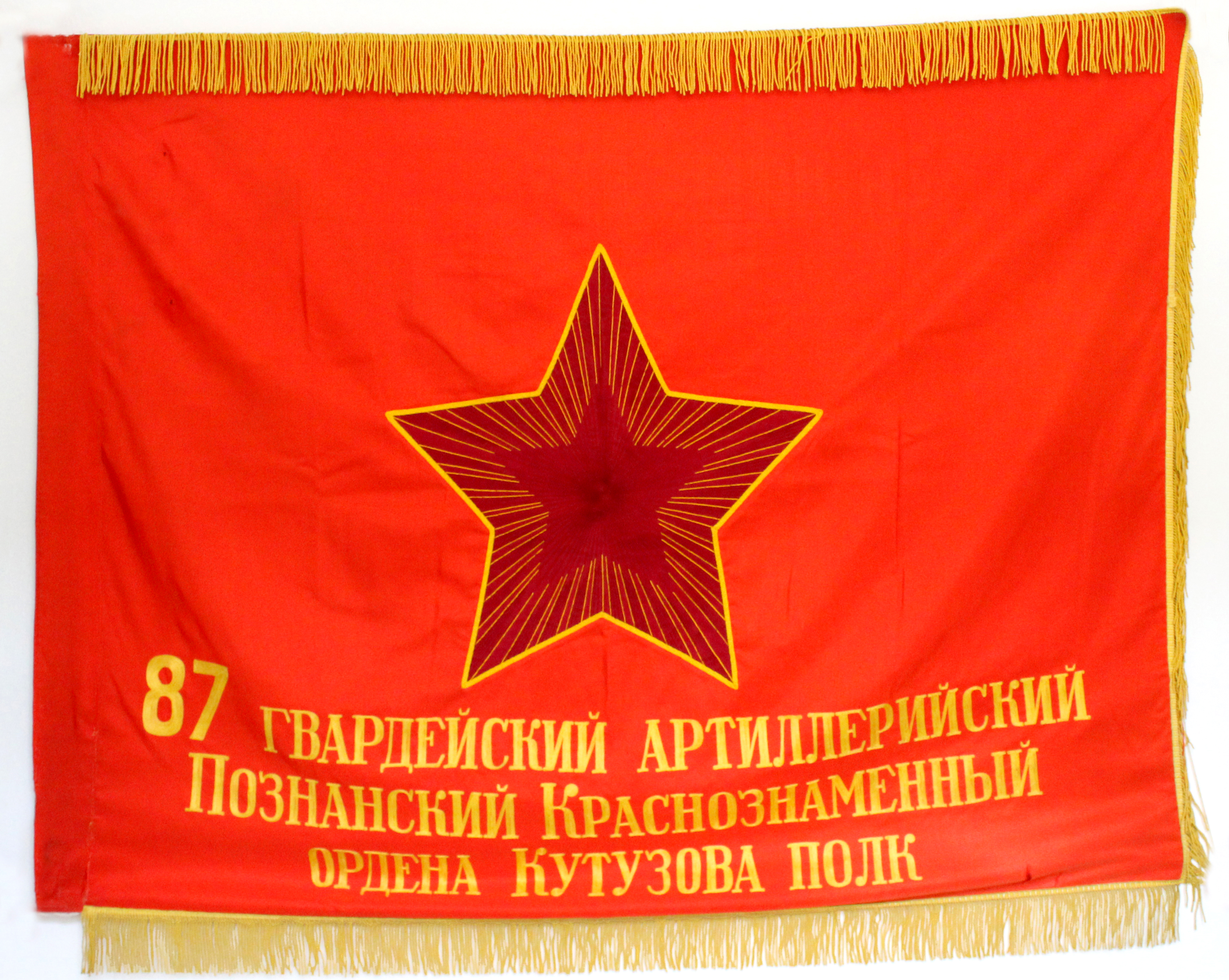 Знамя 87-го гвардейского артиллерийского полка. Аверс